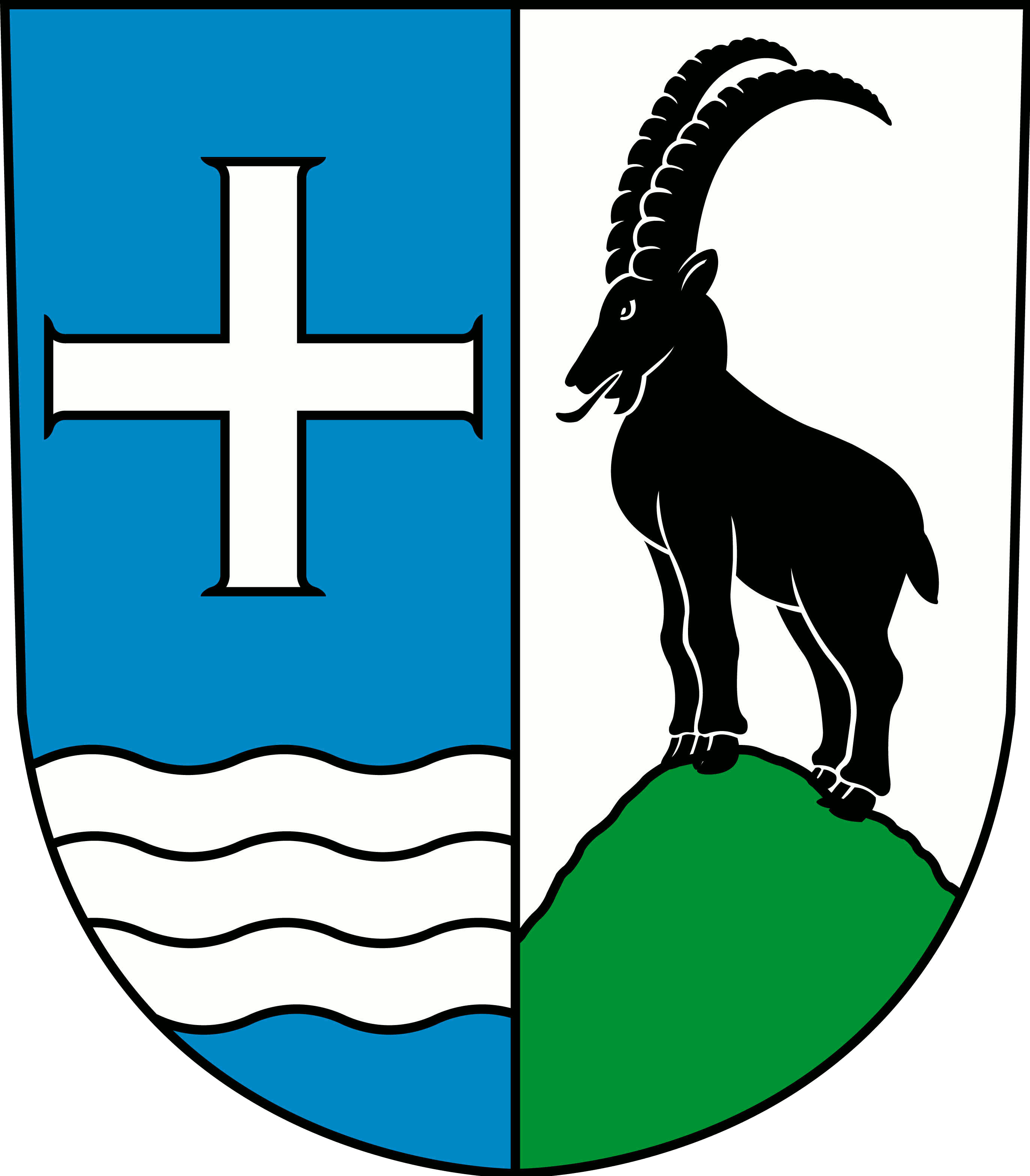 Wappen Gesamtgemeinde Wildhaus-Alt Sankt Johann Kanton St. Gallen Schweiz